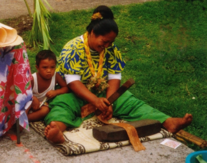 Tapa-Herstellung auf Fatu Hiva, Marquesas-Inseln, Französisch-Polynesien